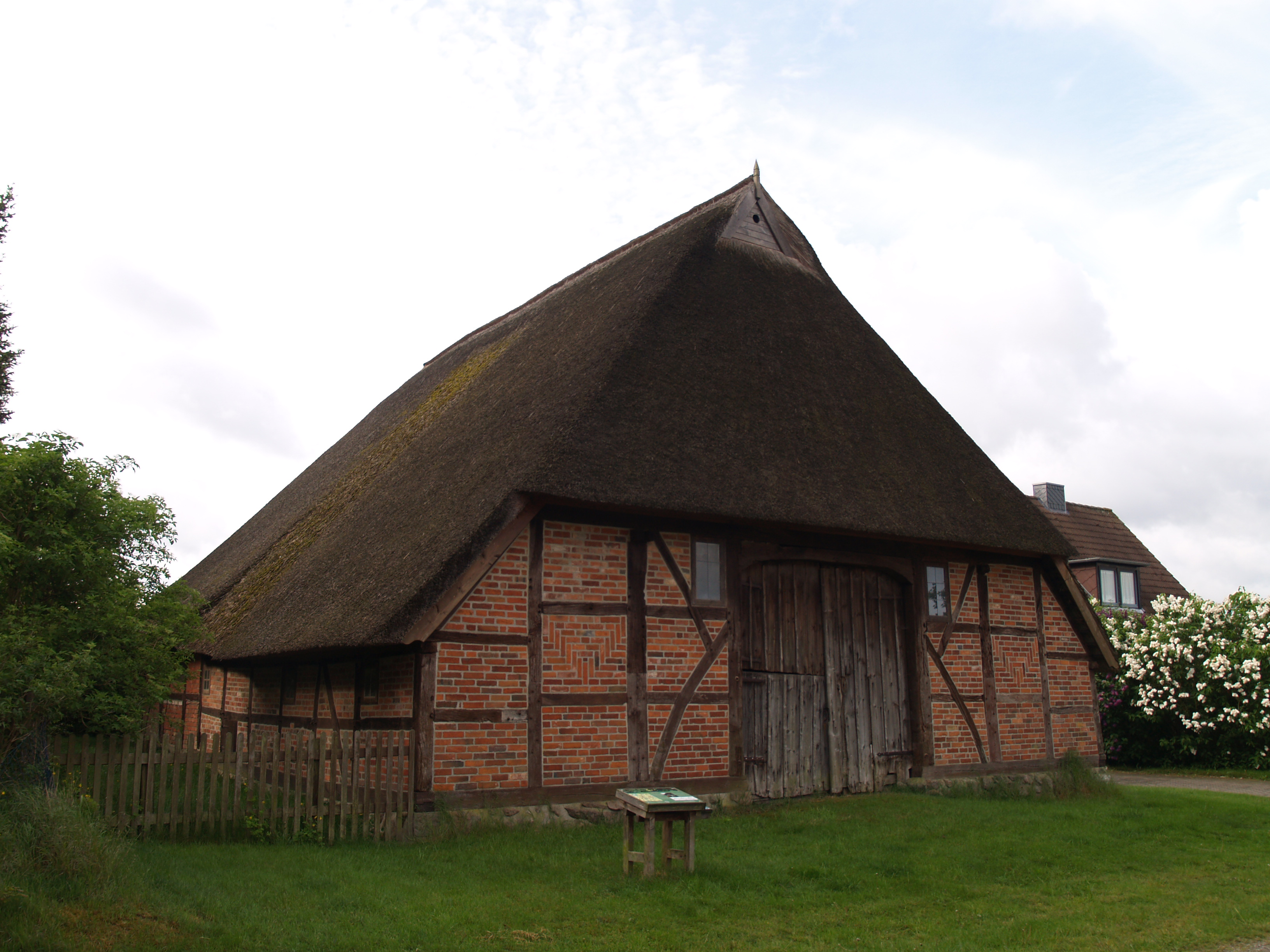 Am Windberg 3 in Woltersdorf, Herzogtum Lauenburg, Deutschland